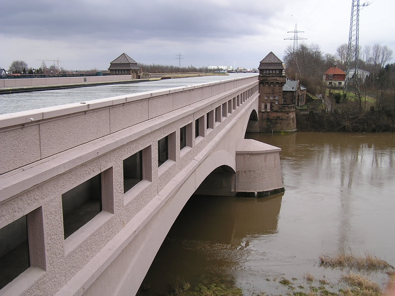 Alte Trogbrücke des Mittellandkanals (oben) über die Weser (unten) beim Wasserstraßenkreuz Minden bei Minden in Nordrhein-Westfalen. Unten am Brückenpfeiler ist das Hilfspumpwerk zu erkennen.